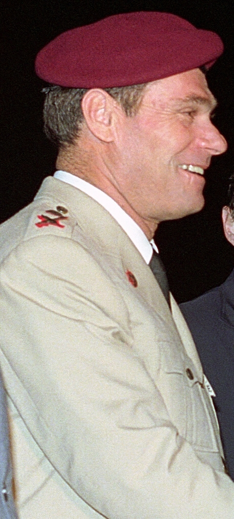 Amos Yaron